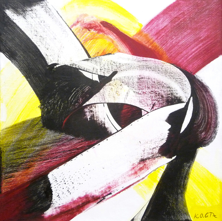 K. O. Götz, Lezuk III, 2012, Acryll auf Leinen, 65 x 65 cm